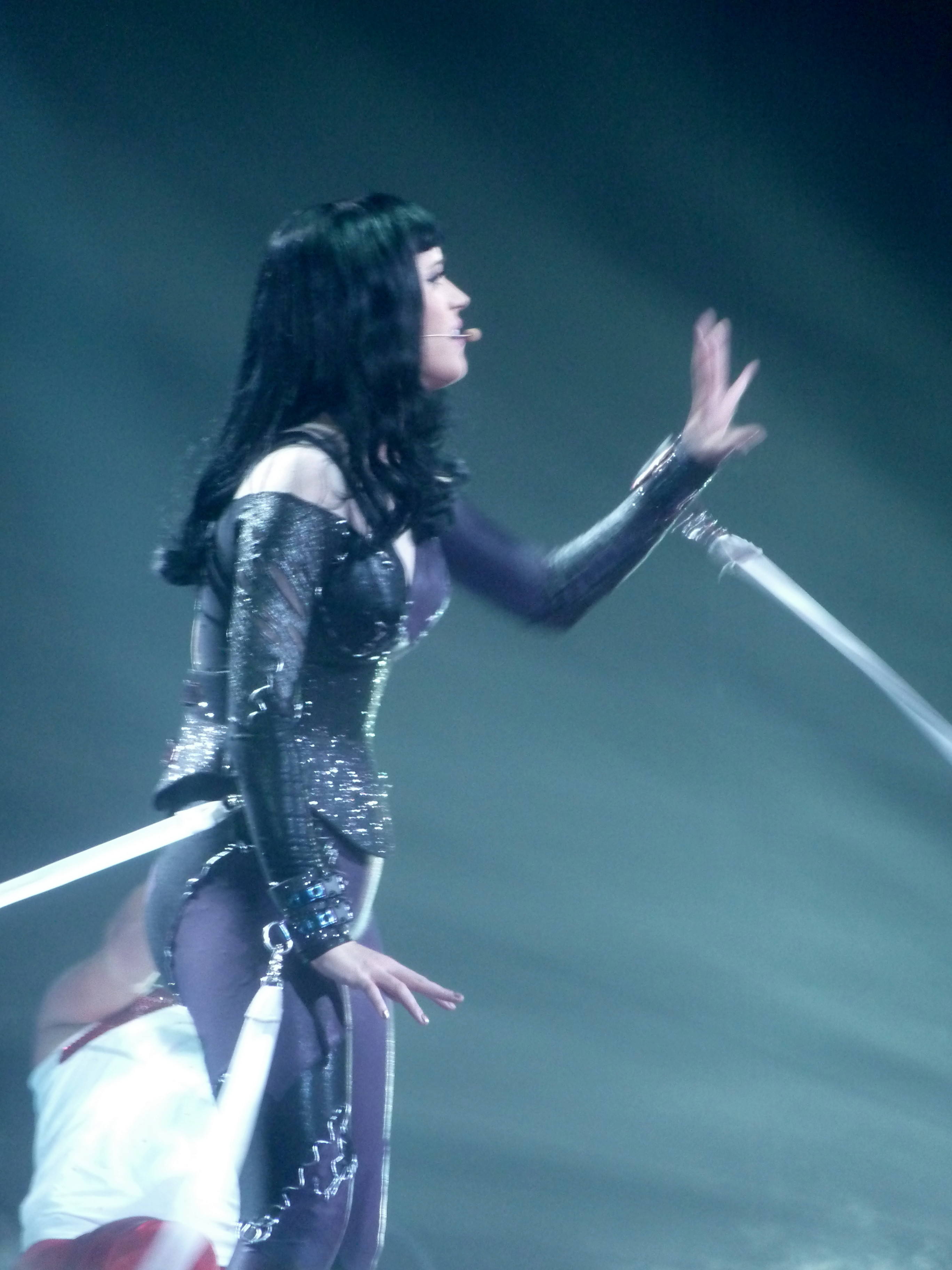 Photos de Katy Perry en concert au Zenith de Paris en mars 2011 dans le cadre de sa tournée " California Dreams Tour "